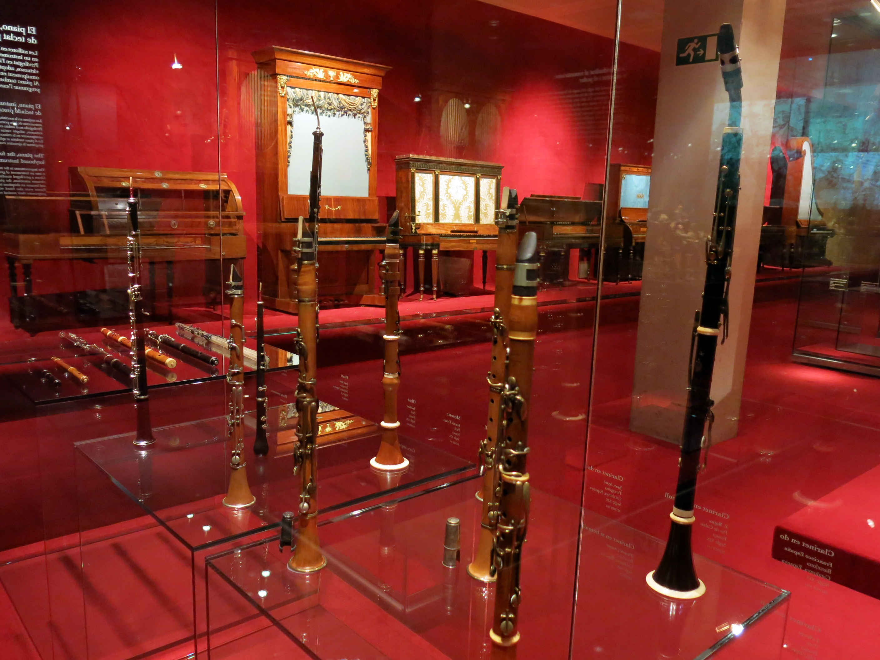 Woodwind instruments at the Museu de la Música de Barcelona